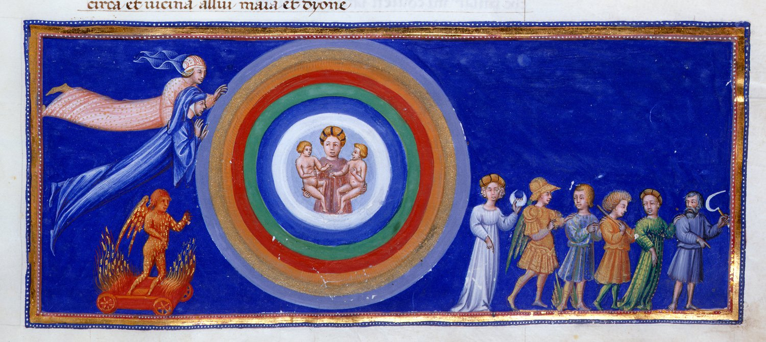 Giovanni di paolo, paradiso 41 sette sfere.jpg